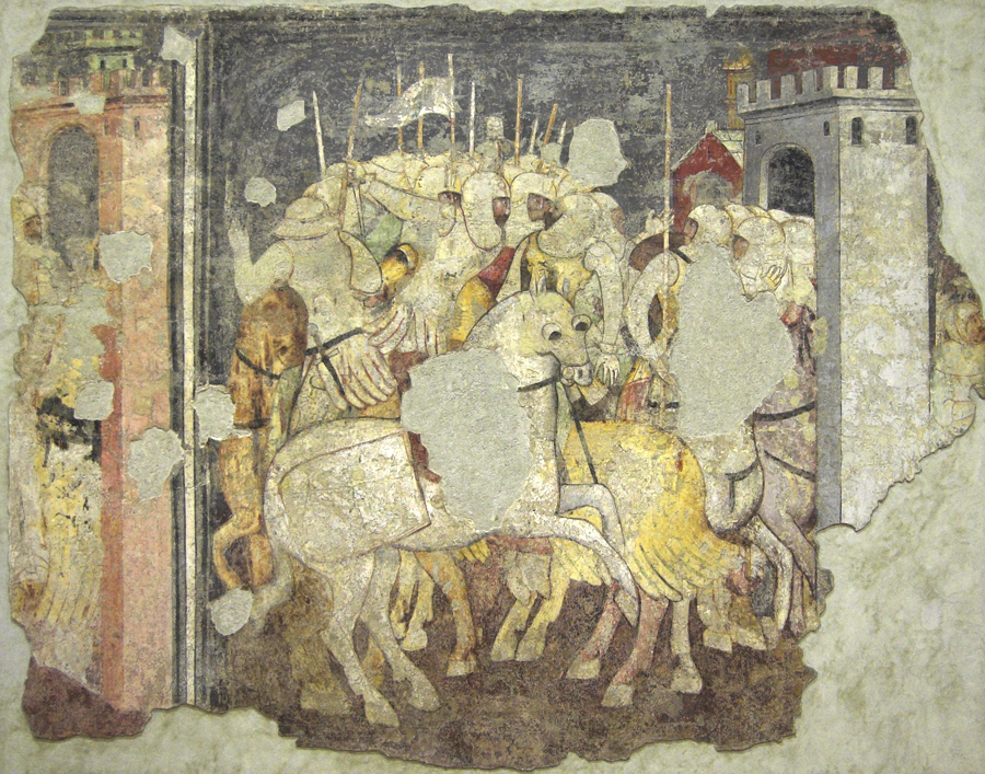 Affresco con cavalieri presente all'interno del museo di Castelvecchio a Verona.